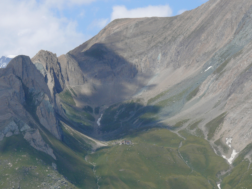 Sajatkar mit Schernerskopf (3038 m, Bildmitte) mit Sajathütte und Roter Säule (ganz links, im Hintergrund Großvenediger) von Süden.